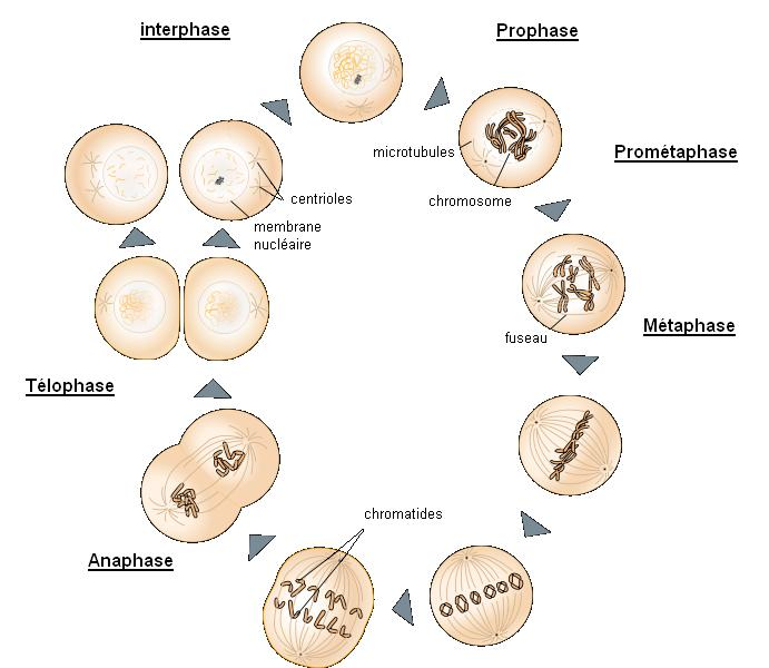 Schéma de la mitose